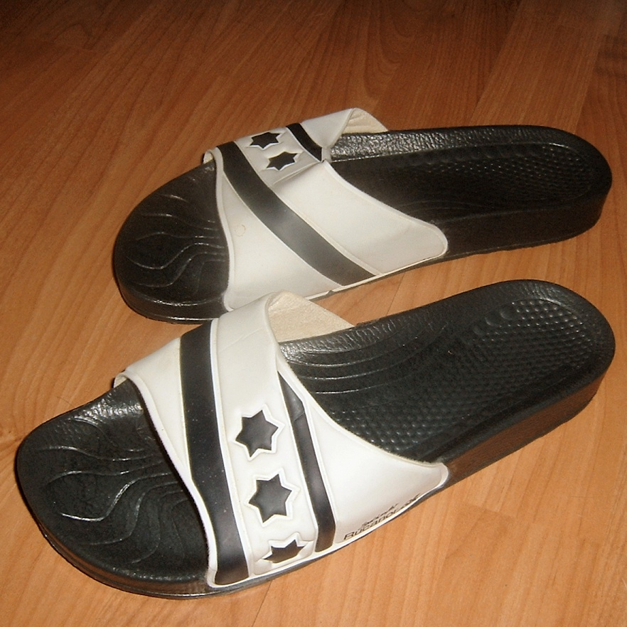 Slippers - eigen werk